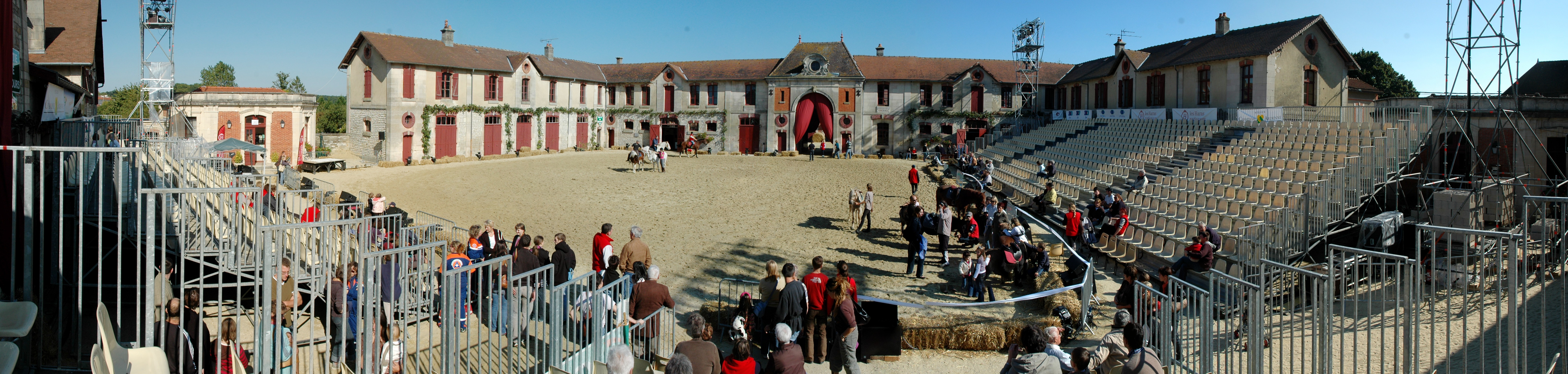 Vue panoramique du haras national de Montier-en-Der